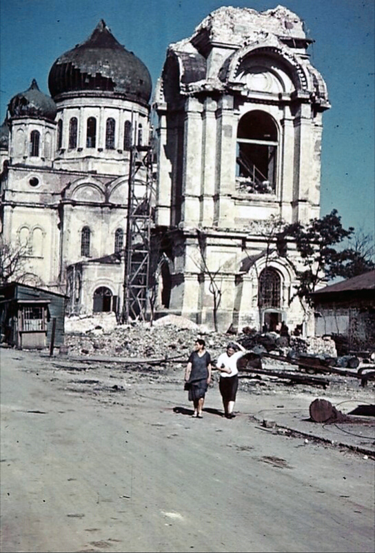 Рождественский собор в Ростове-на-Дону в период нацистской оккупации